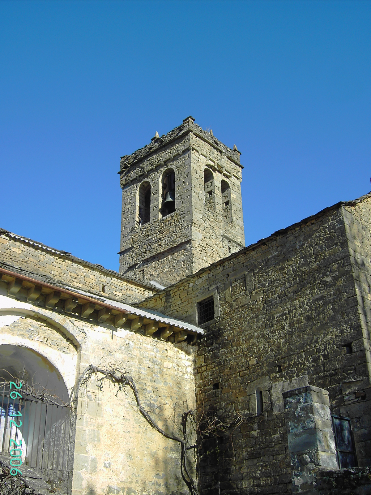 El campanario de la iglesia de Asín de Broto, en la boca del Valle de Broto.